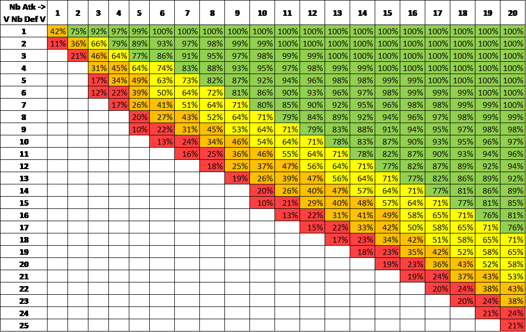 Tableau de calculs de probabilité de victoire de X attaquants contre Y défenseurs. En rouge sont indiqués les valeurs inférieures à 25% ; en orange sont indiquées les valeurs entre 25 et 50% ; en jaune entre 50 et 75% et en vert au delà de 75%. Les résultats inférieurs à 10% ont été retirés car peu susceptibles d'être joués en réalité.